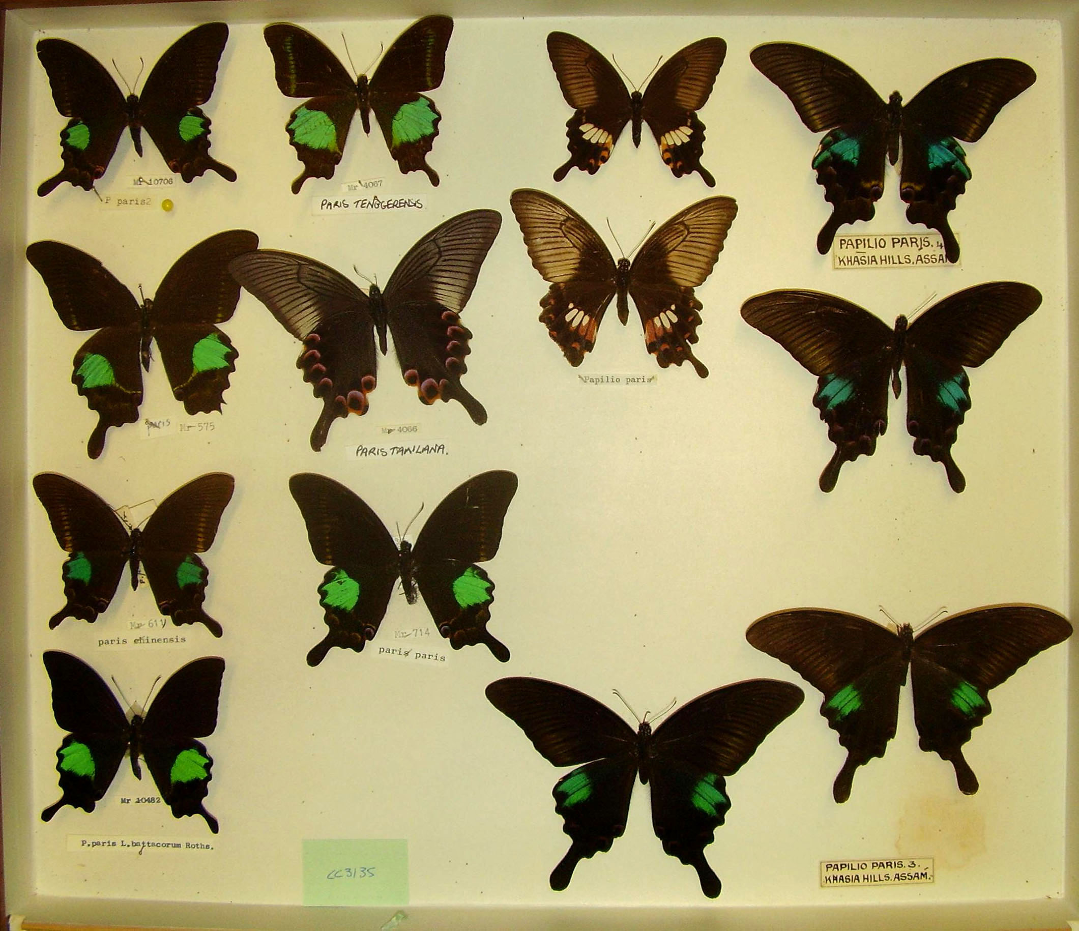 Papilio paris forms